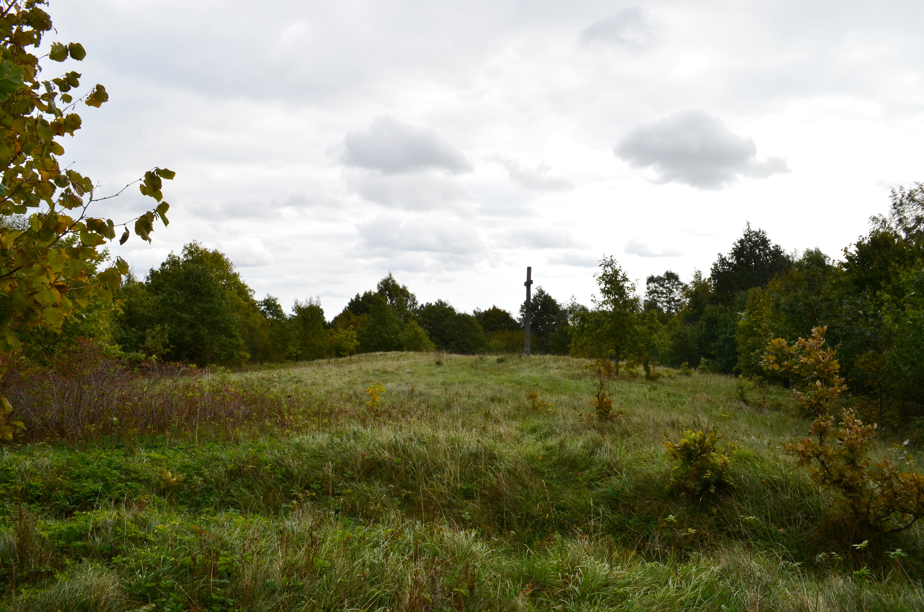 Girgždūtės viršūnė, Telšių raj.